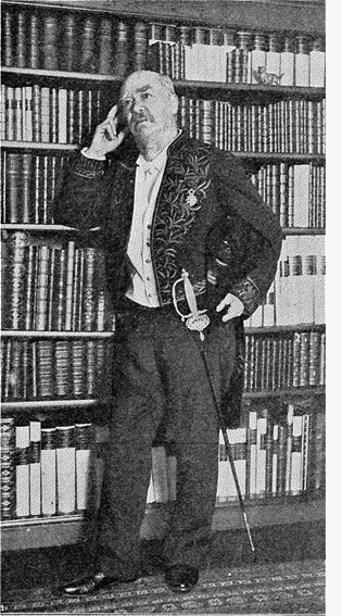 Émile Gebhart Gebhart pose debout devant une bibliothèque, vêtu de l'habit vert d'académicien français et de l'épée